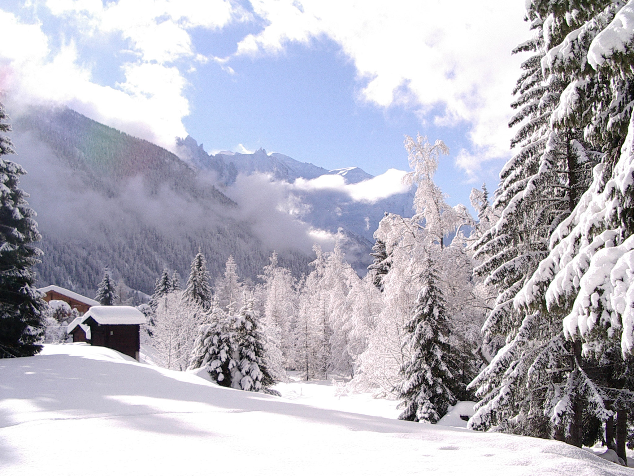 Cette photo a été prise de la fenêtre d'un chalet typique d'Argentière. Cette vue et le chalet sont maintenant menacés par un projet de pont routier envisagé pour sécuriser contre les avalanches